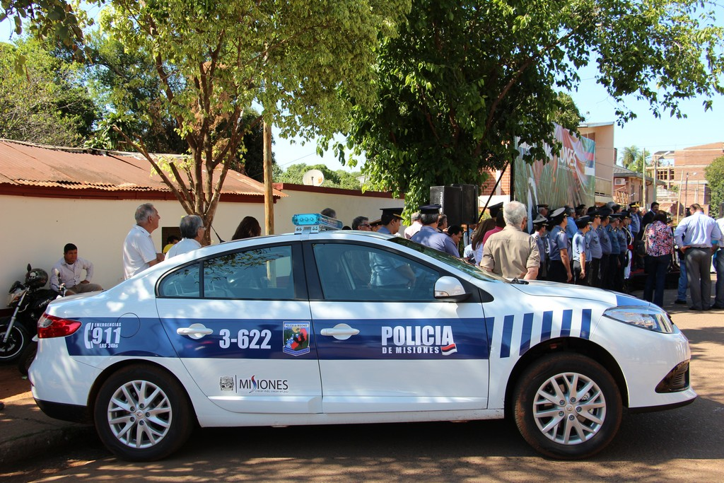 Patrullero de la Policía de la Provincia de Misiones